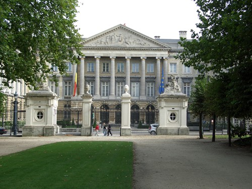 Brussel·les - Palau del Parlament Belga